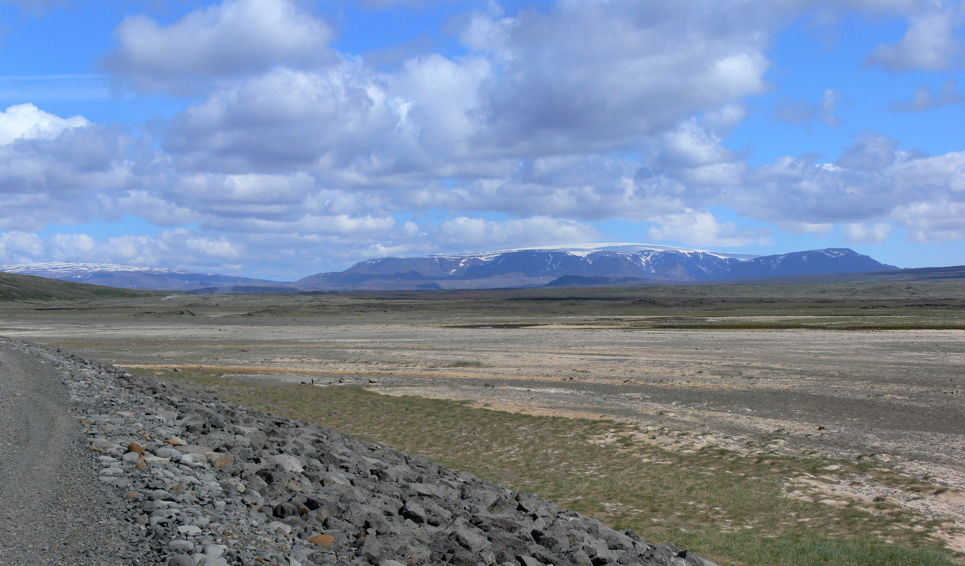 Uxahryggir.